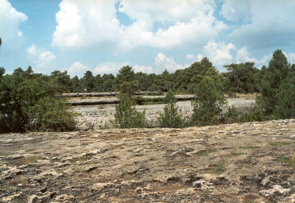 Mar de piedra. Otro ejemplo de lenar o lapiaz en la Ciudad Encantada de (Cuenca). Autor: Fev. Fecha: Agosto 2002